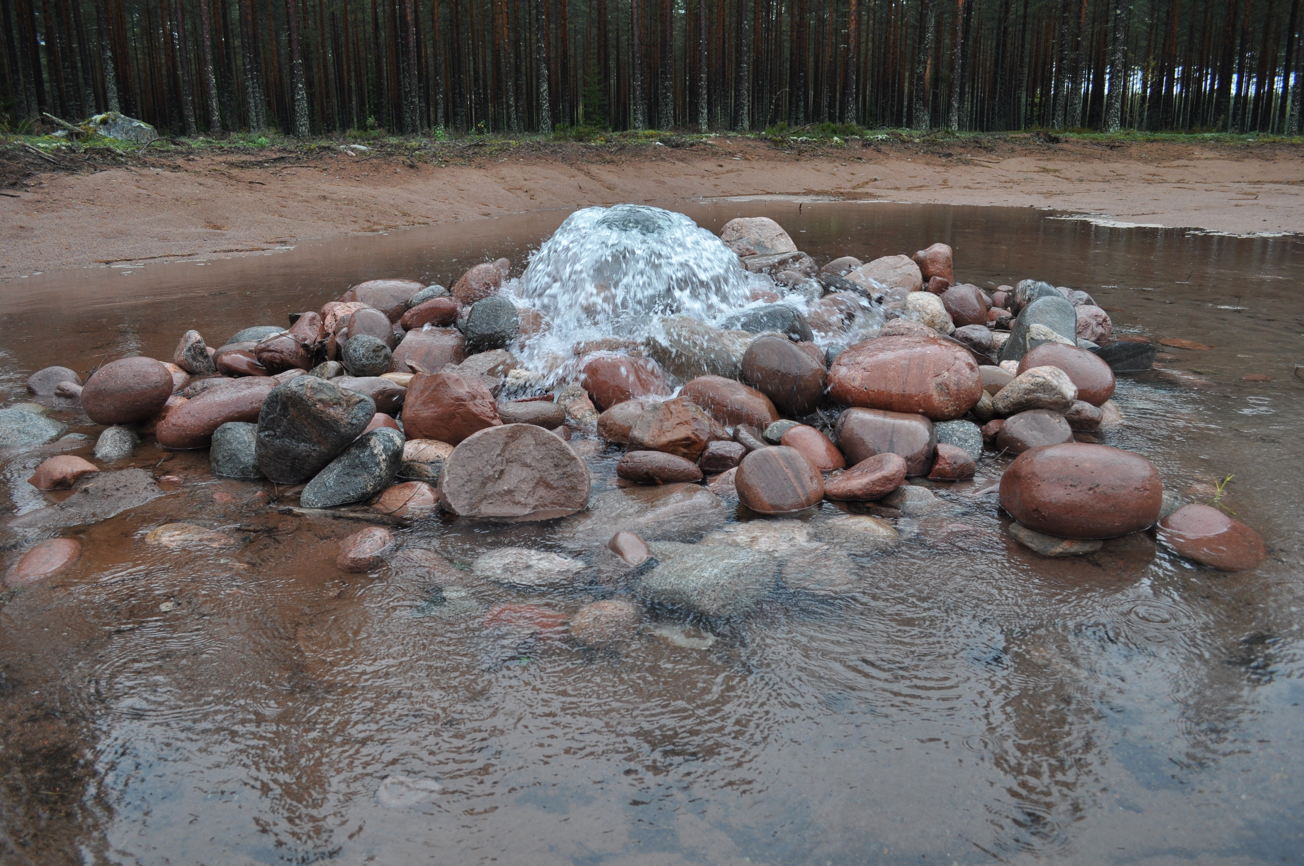 Turun Seudun Vesi Oy:n tekopohjavesilaitoksella Kokemäenjoen esikäsitelty raakavesi imeytetään altaiden kautta Virttaankankaan harjumuodostumaan.